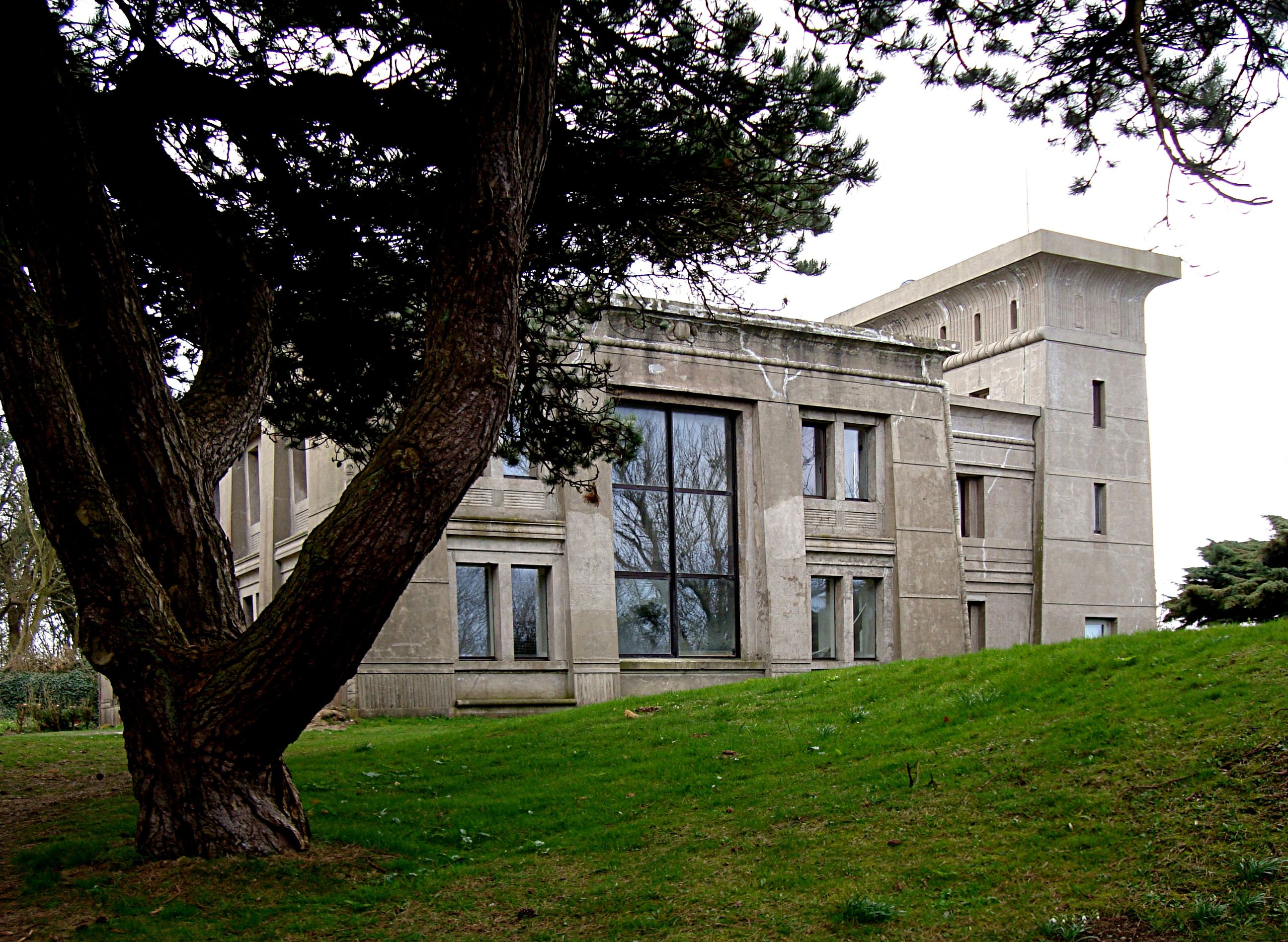 La villa néo-égyptienne le Typhonium construite en 1891 par l'architecte belge Edmond Devigne pour le couple de peintres Adrien Demont et Virginie Demont-Breton à Wissant (Pas-de-Calais).